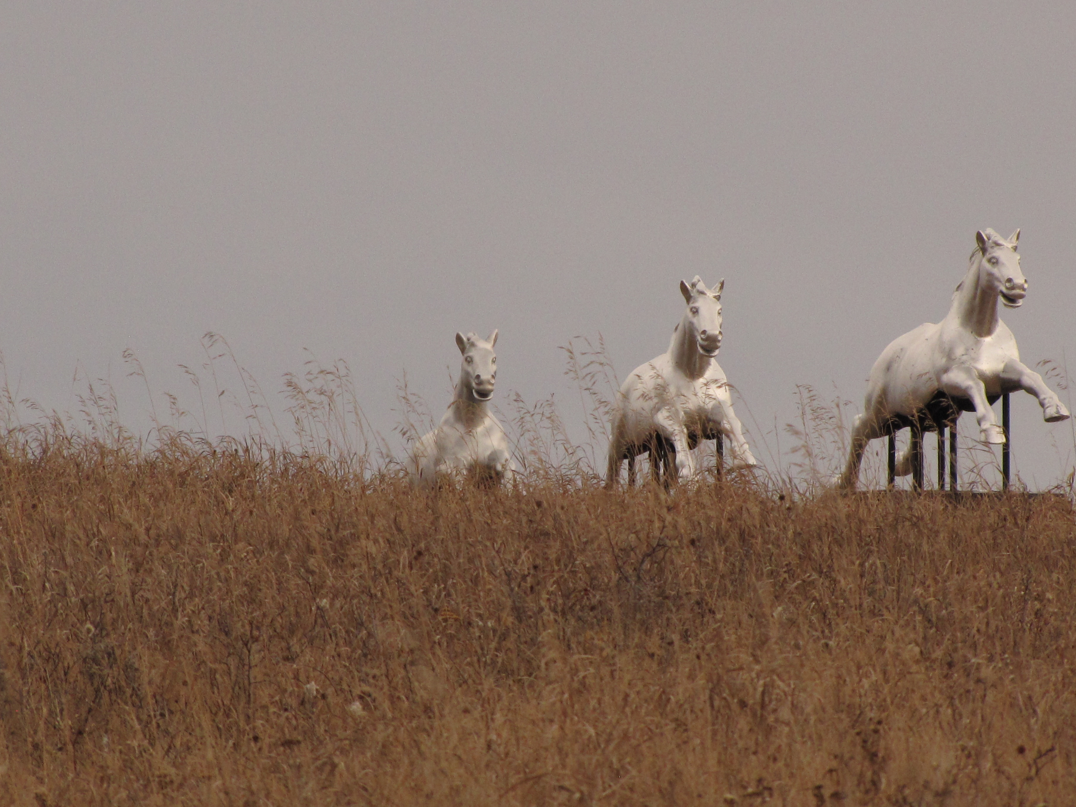 Helios #4